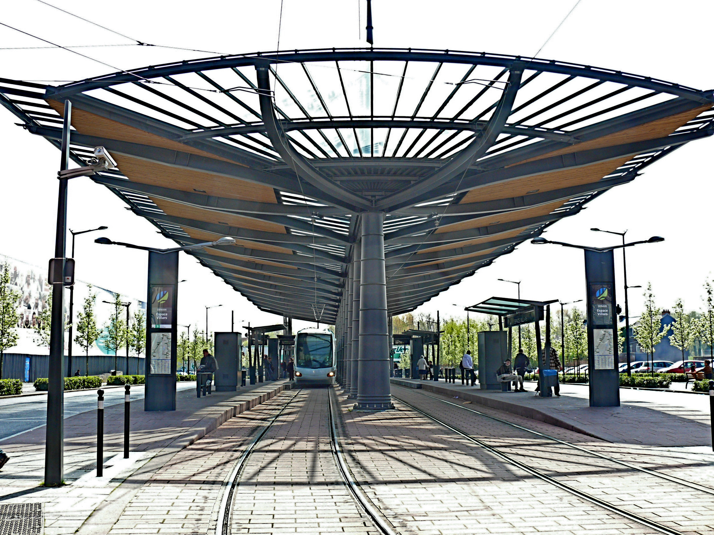 Tramway de Valenciennes : Le terminus de la ligne 1 à Espace Villars à DenainLa station est entourrée d'une voie routière, permettant le stationnement des bus et une correspondance aisée des passagers